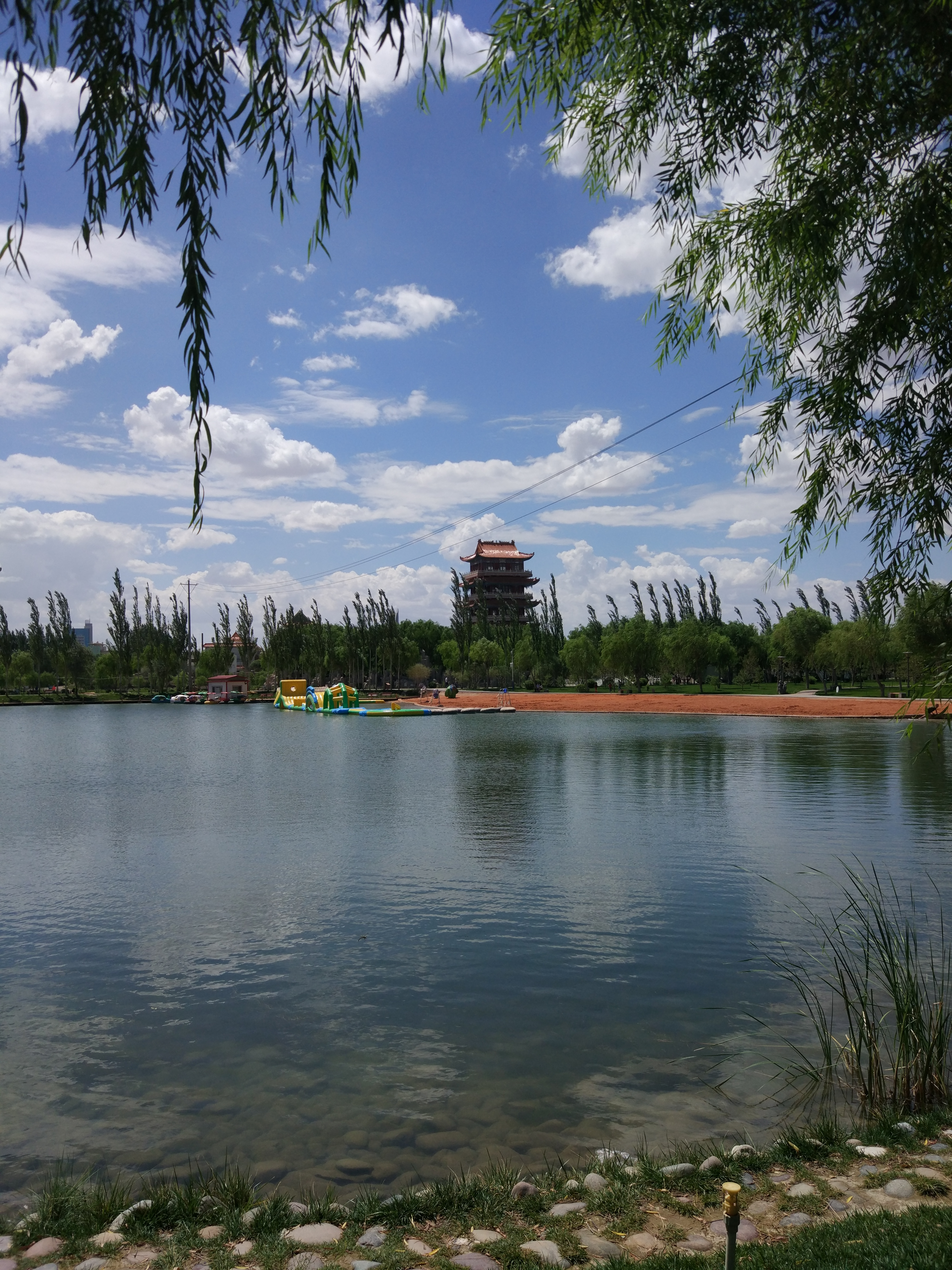 玉门市玉泽湖公园，玉泽湖和远处的楼阁，摄于2017年8月